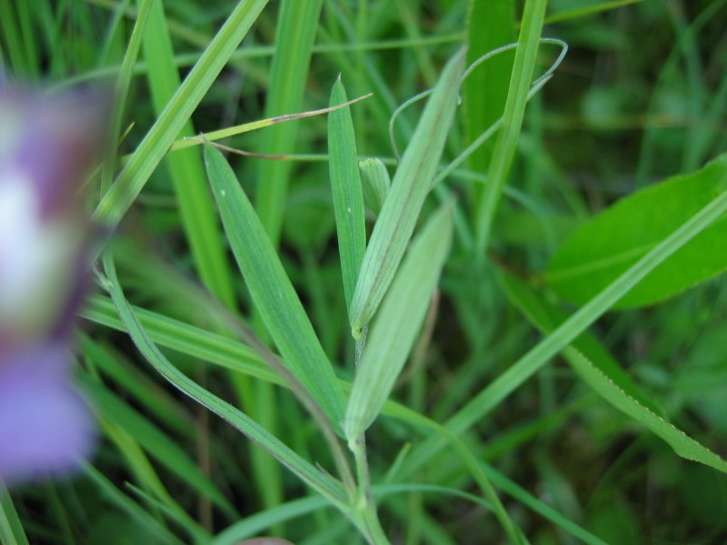 Lathyrus palustris Sumpf-Platterbse, Müritz-Gebiet